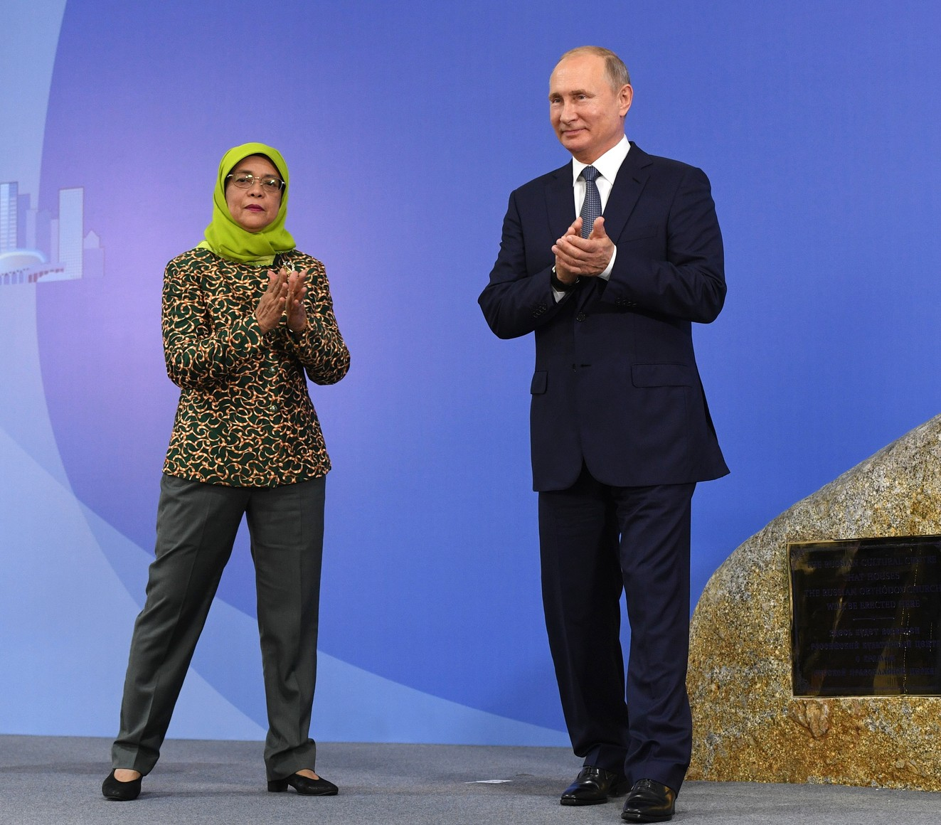 Vladimir Putin and President of Singapore Halimah Yacob attended the groundbreaking ceremony for a Russian Cultural Centre.